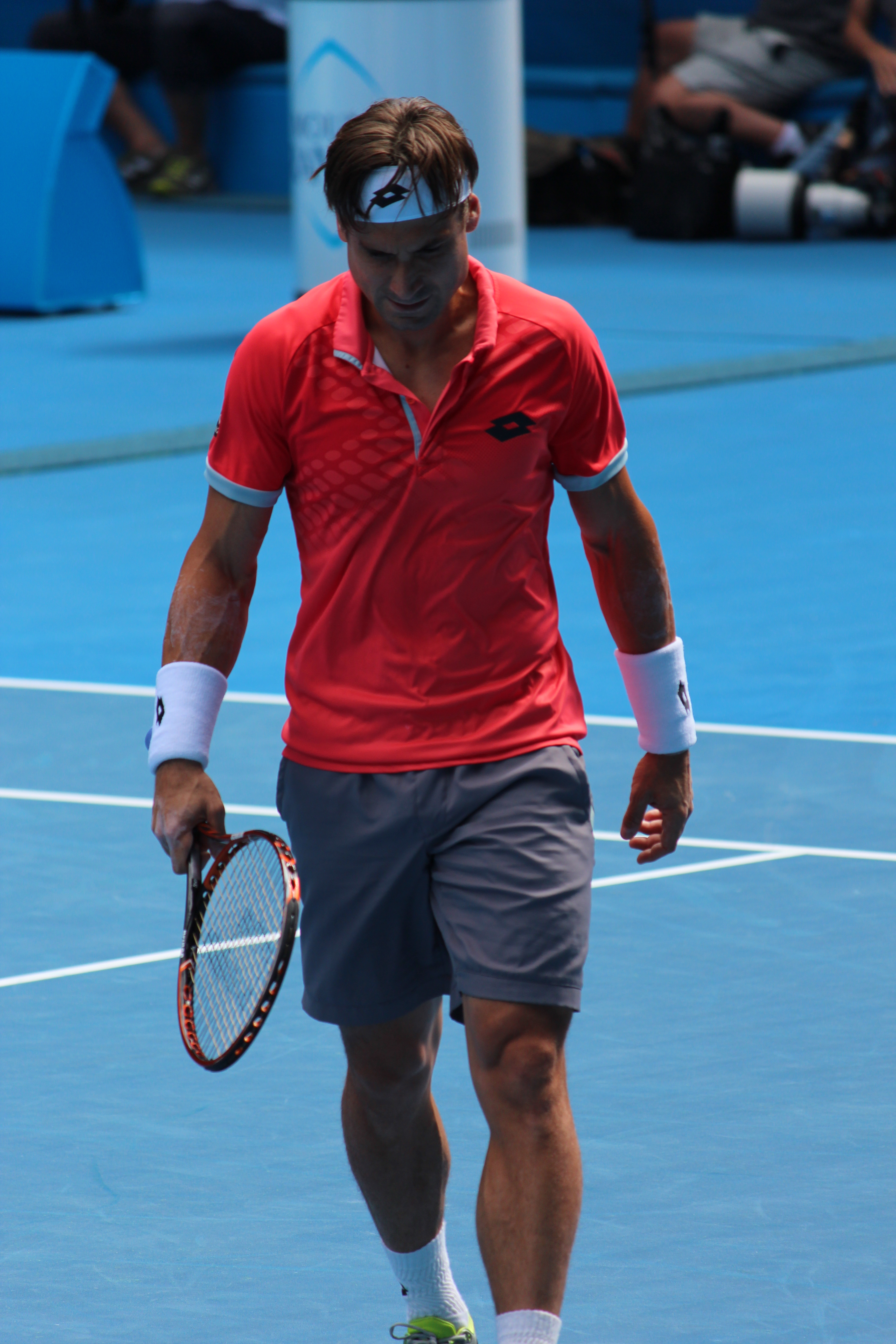 David Ferrer